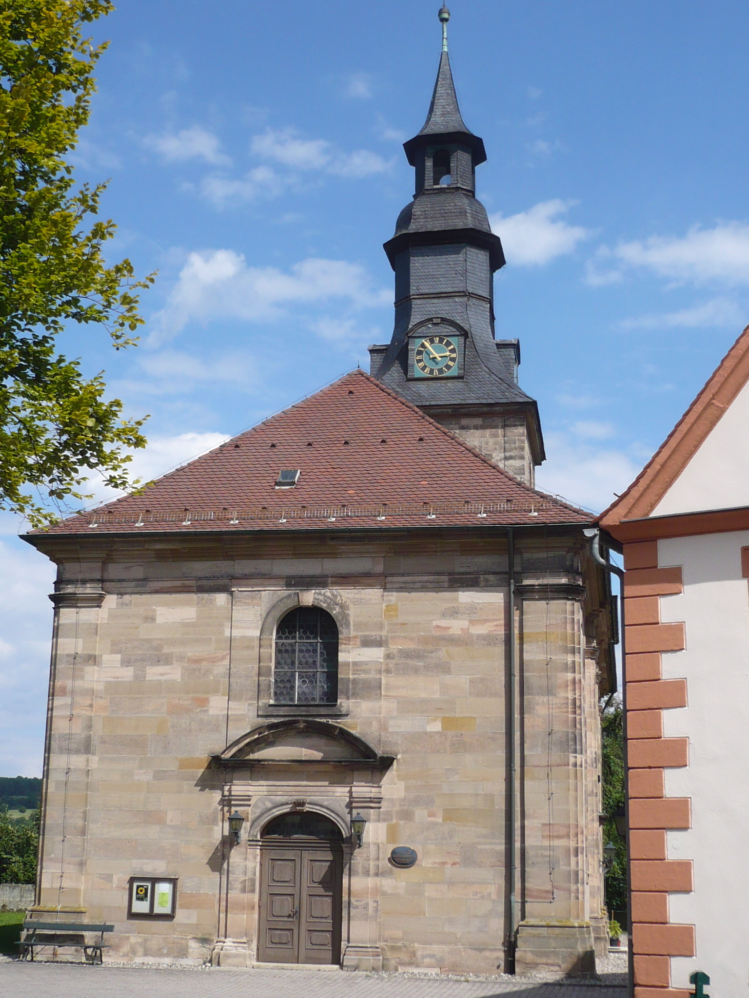 evang.-luth. Kirche St.Johannis Bayreuth